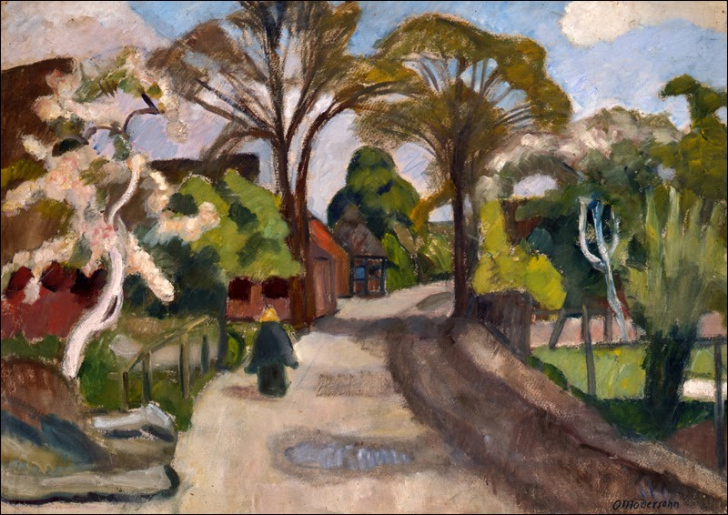 Dorfstraße im Frühling